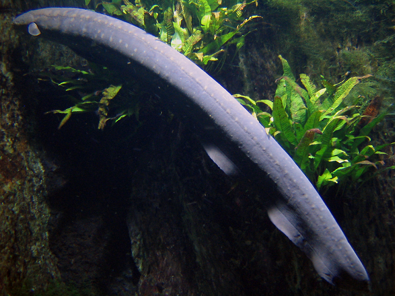 Electrophorus electricus, Kopf und vorderer Rumpf; eigene Aufnahme.